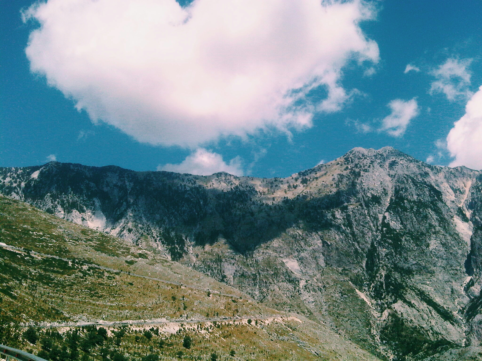 Llogara, Vlore